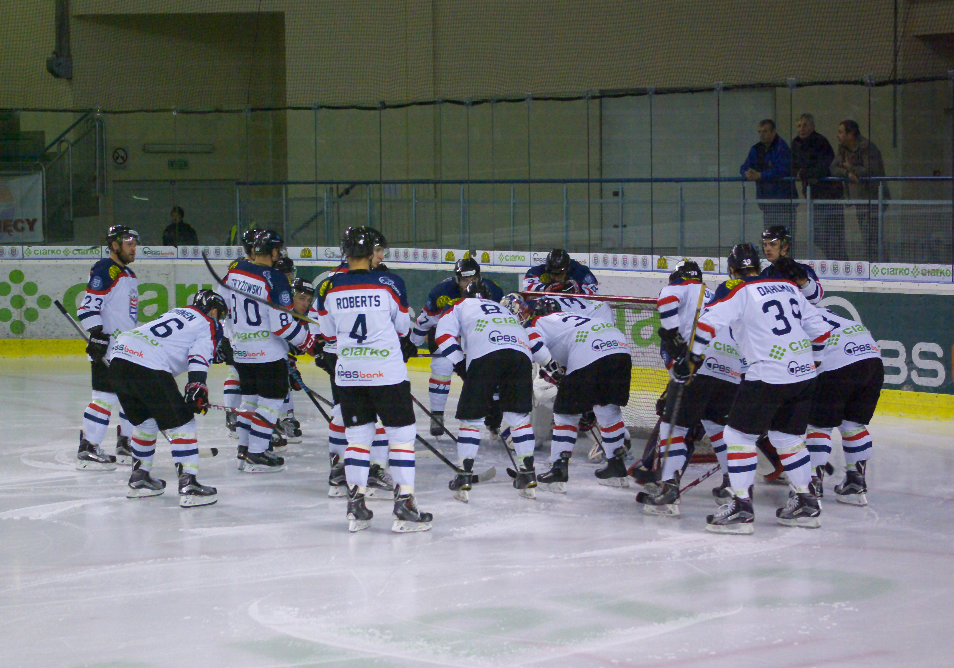 Mecz STS Sanok - Podhale Nowy Targ 1:4 (Arena Sanok, 23 października 2015).